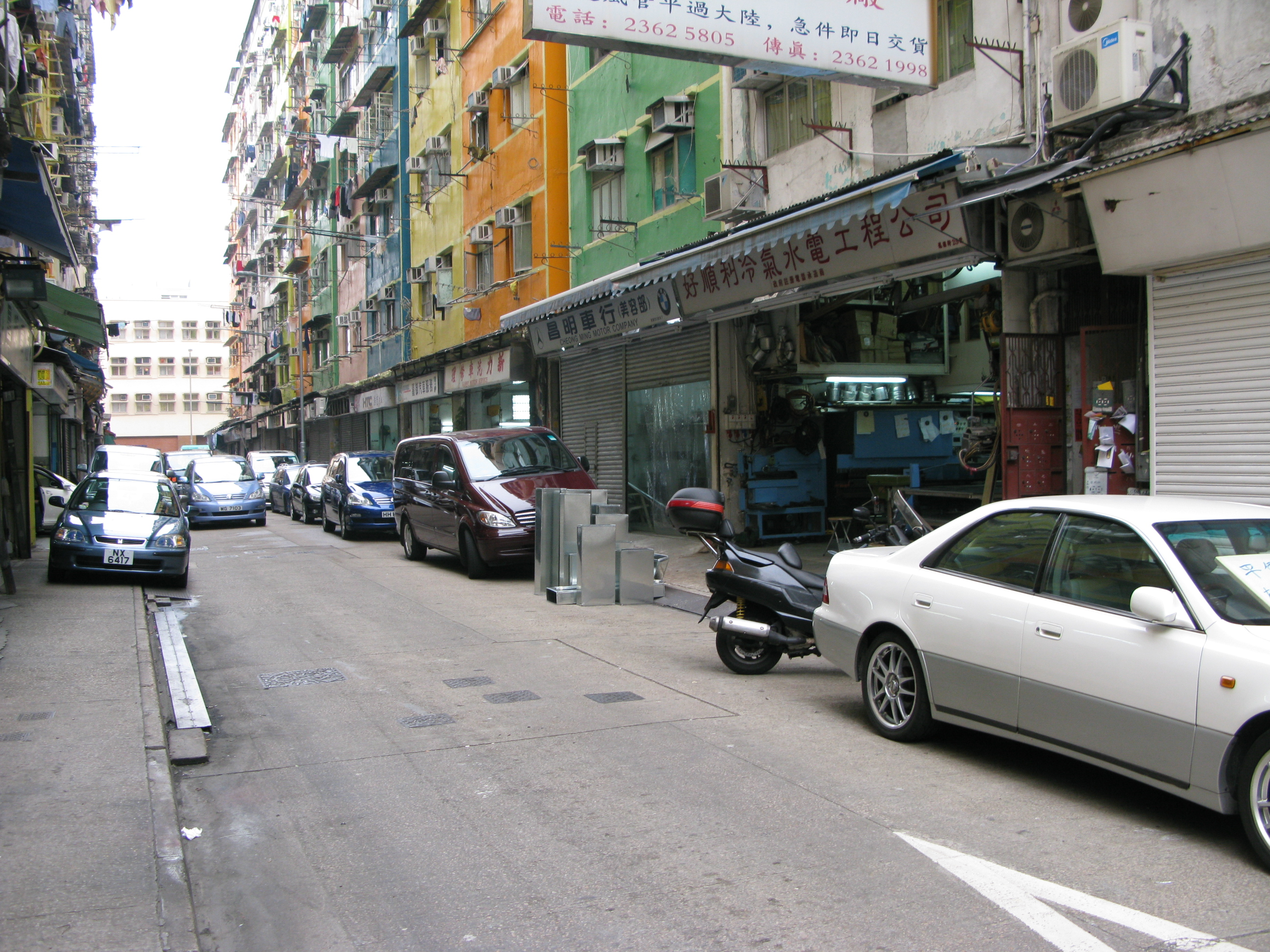 中文（香港）: 香港九龍土瓜灣龍圖街